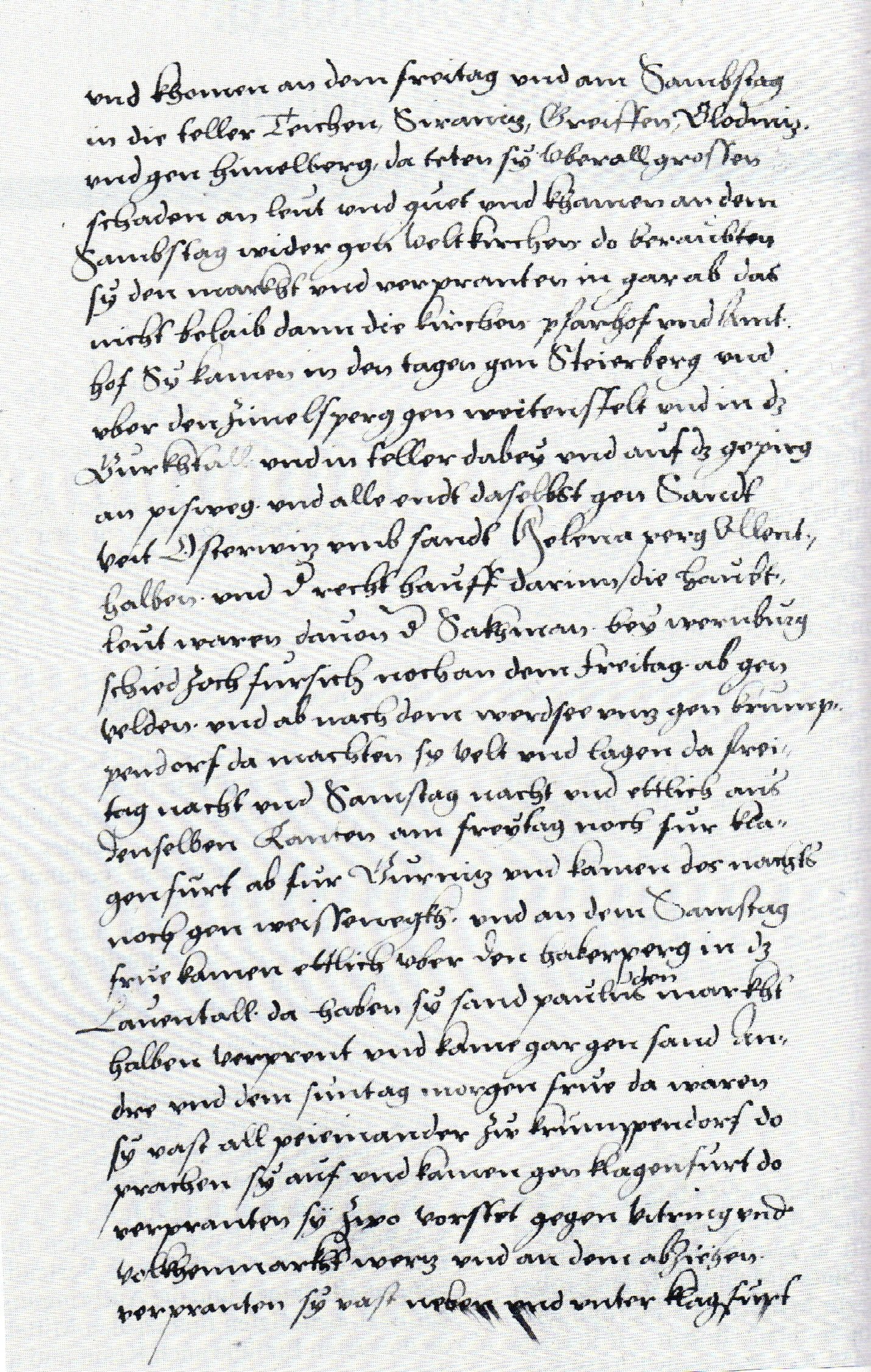 Jakob Unrest: Österreichische Chronik, ÖNB Wien Cod. 8007, Bl. 115r